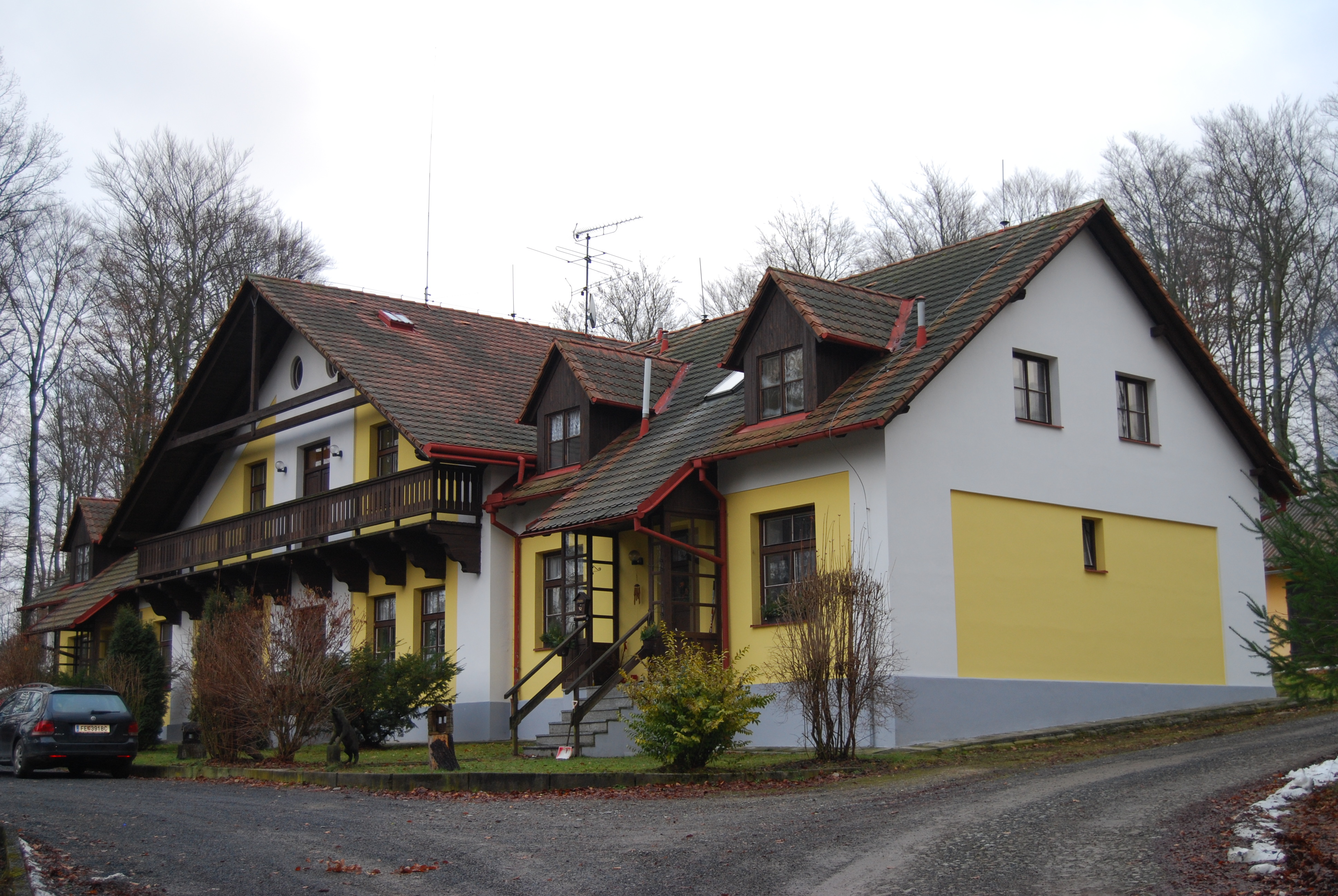 Bývalá hajnice v areálu obory. Rukávečská obora, zvaná též Květovská obora. Rukáveč - část města Milevsko v okrese Písek. Česká republika.